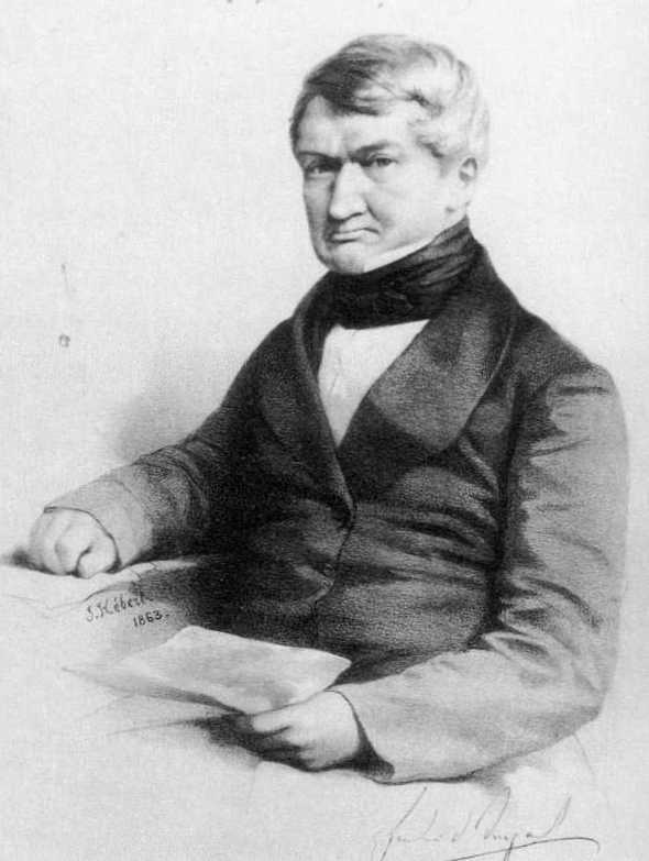 Friedrich Freiherr von Diergardt, Kupferstich von J. Kébcil, 1863